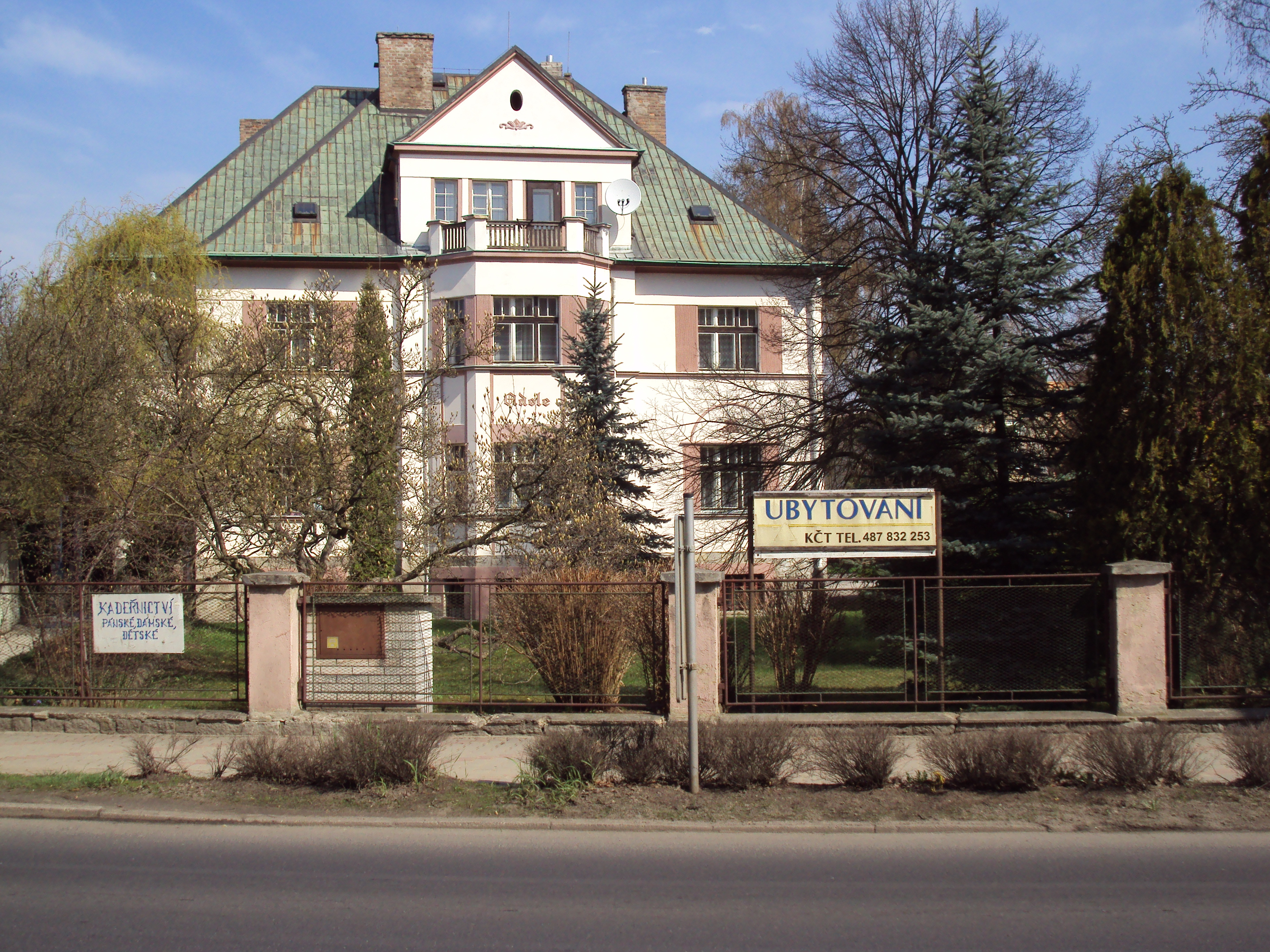 Vila Adéla patří Klubu českých turistů, je na Děčínské ulici v České Lípě